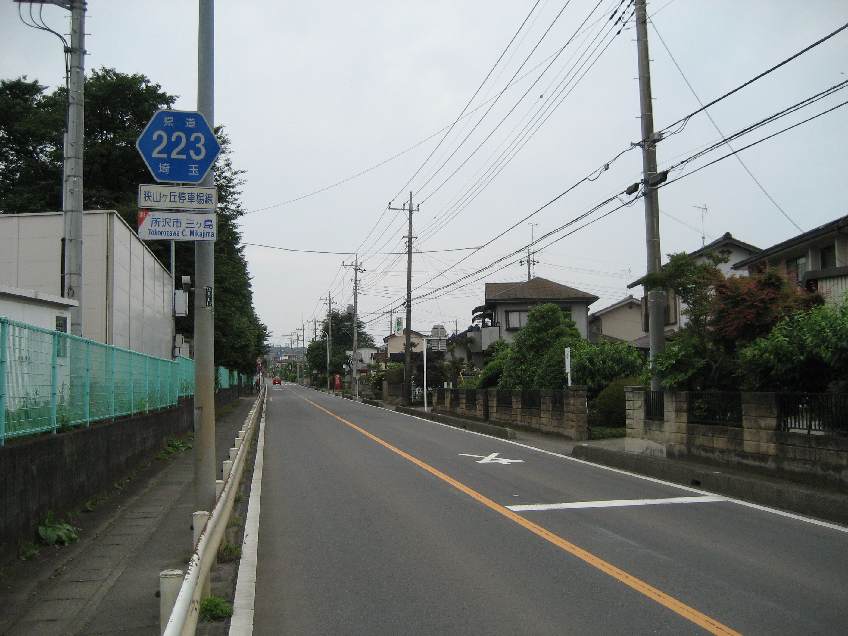 埼玉県道223号線所沢市内